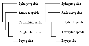 kladogrami filogenije lisnatih mahovina